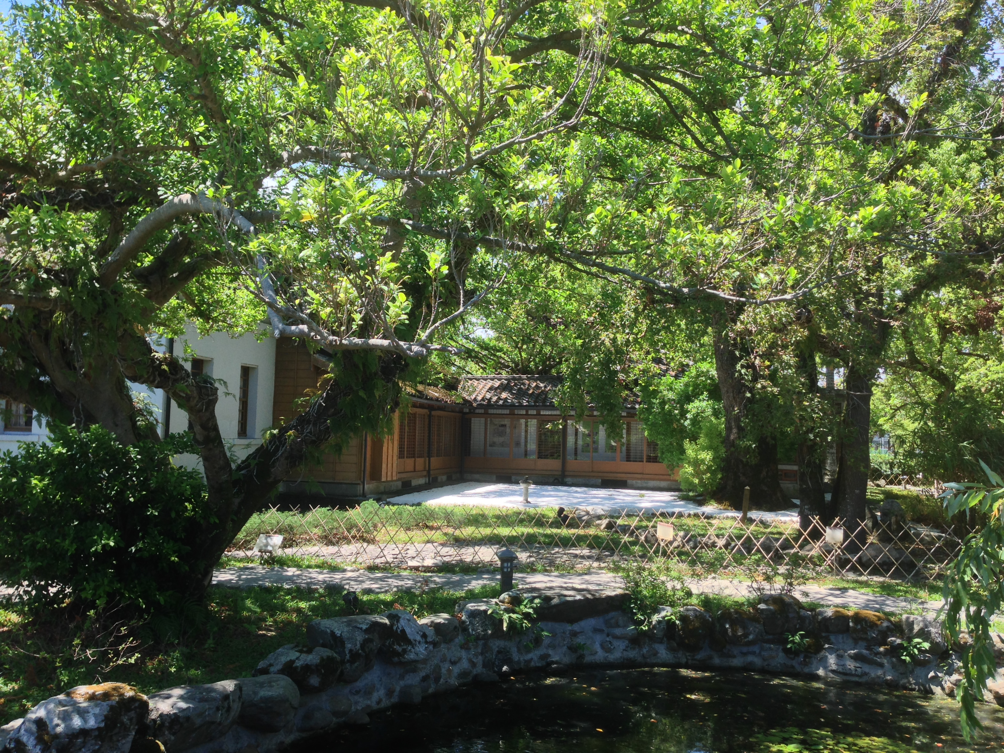 中文（台灣）: 宜蘭設治紀念館一景